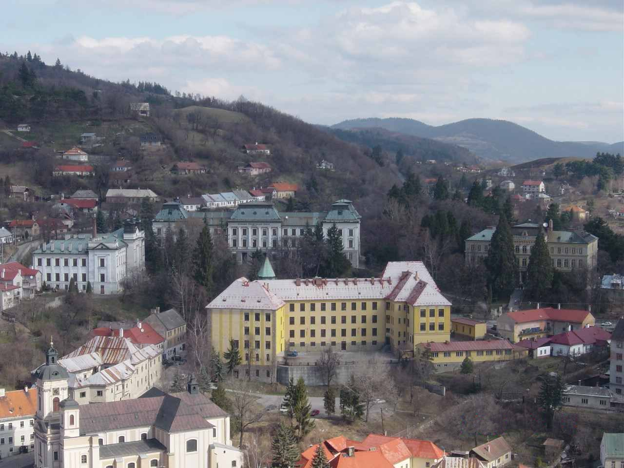 Selmecbánya: a kémiai, bányászati, és az erdészeti palota látképe